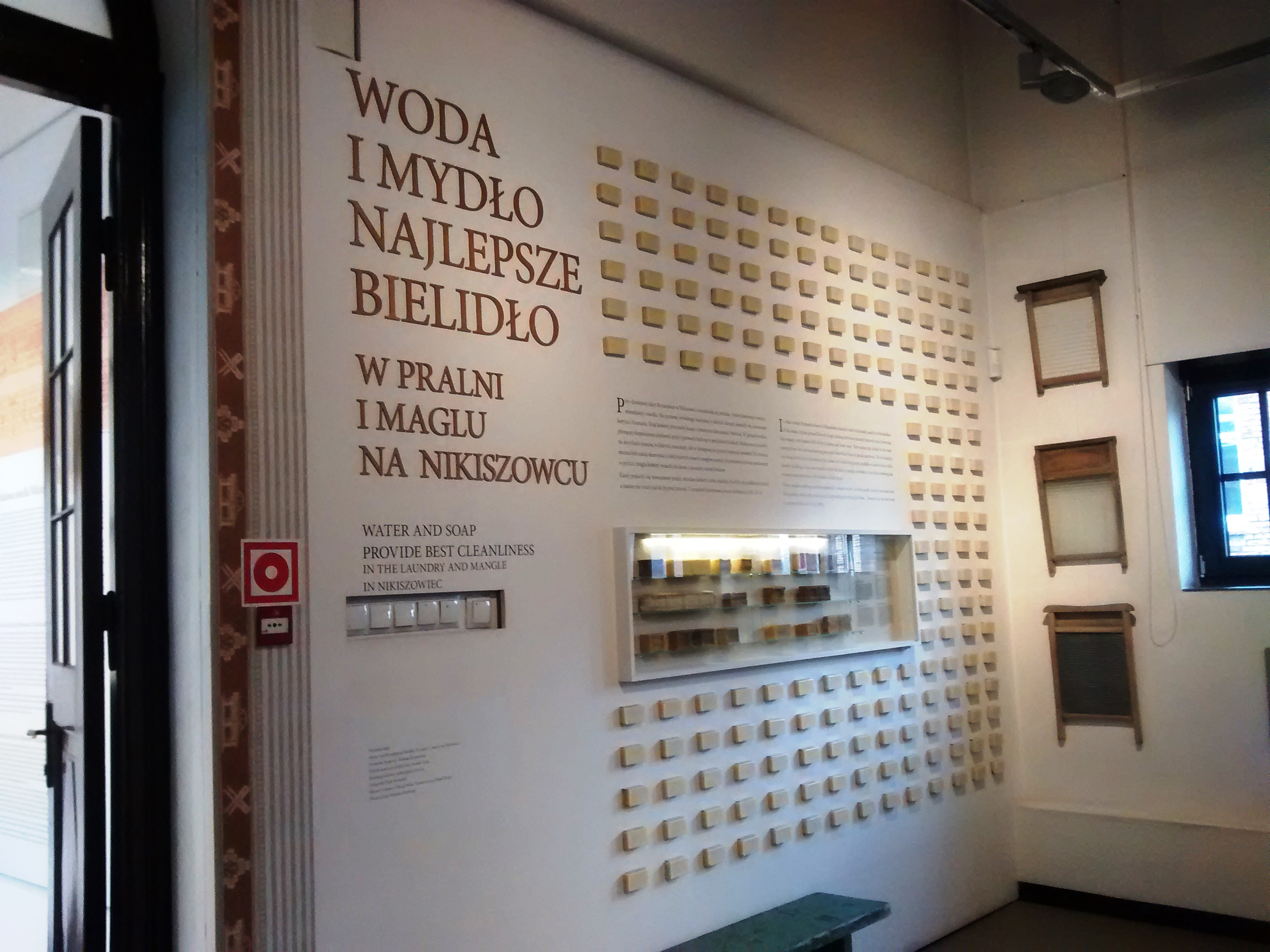 Wystawa „Woda i mydło najlepsze bielidło. W pralni i maglu na Nikiszowcu” w budynku Działu Etnologii Miasta Muzeum Historii Katowic przy ul. Rymarskiej 4 w dzielnicy Nikiszowiec